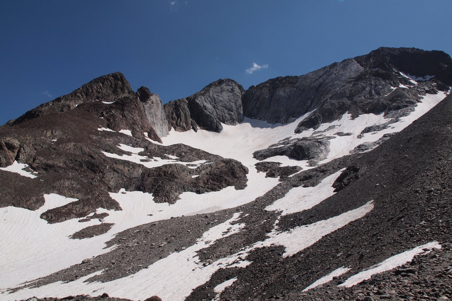 Puertos de Panticosa, Bramatuero y Brazatos This is a photography of a Site of Community Importance in Spain with the ID: ES2410040. Natura2000 entry, EEA entry